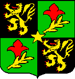 Blason de Jadotville/Likasi (Congo). Selon Patrick Pierloz: «L’héraldique civique du Congo belge (1908 – 1960)», in «Kisugulu», n° 76.